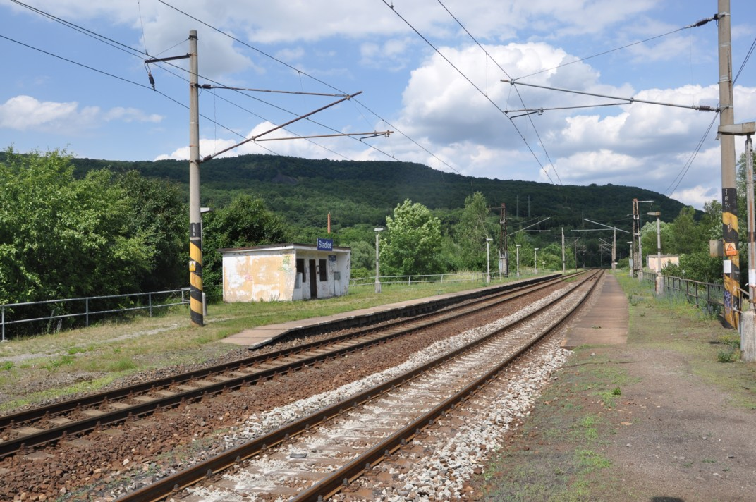 Haltestelle Stadice an der Bahnstrecke Trmice–Bílina, Tschechien